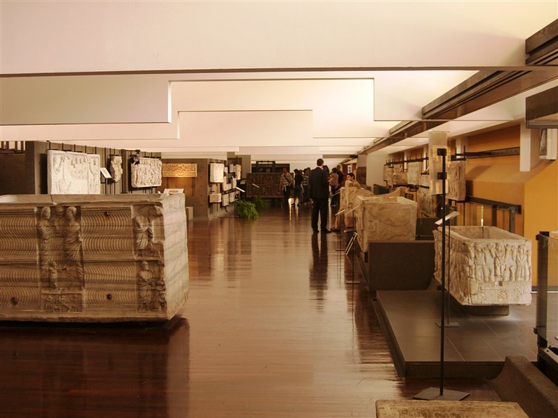 Vatican Museum Antiquities